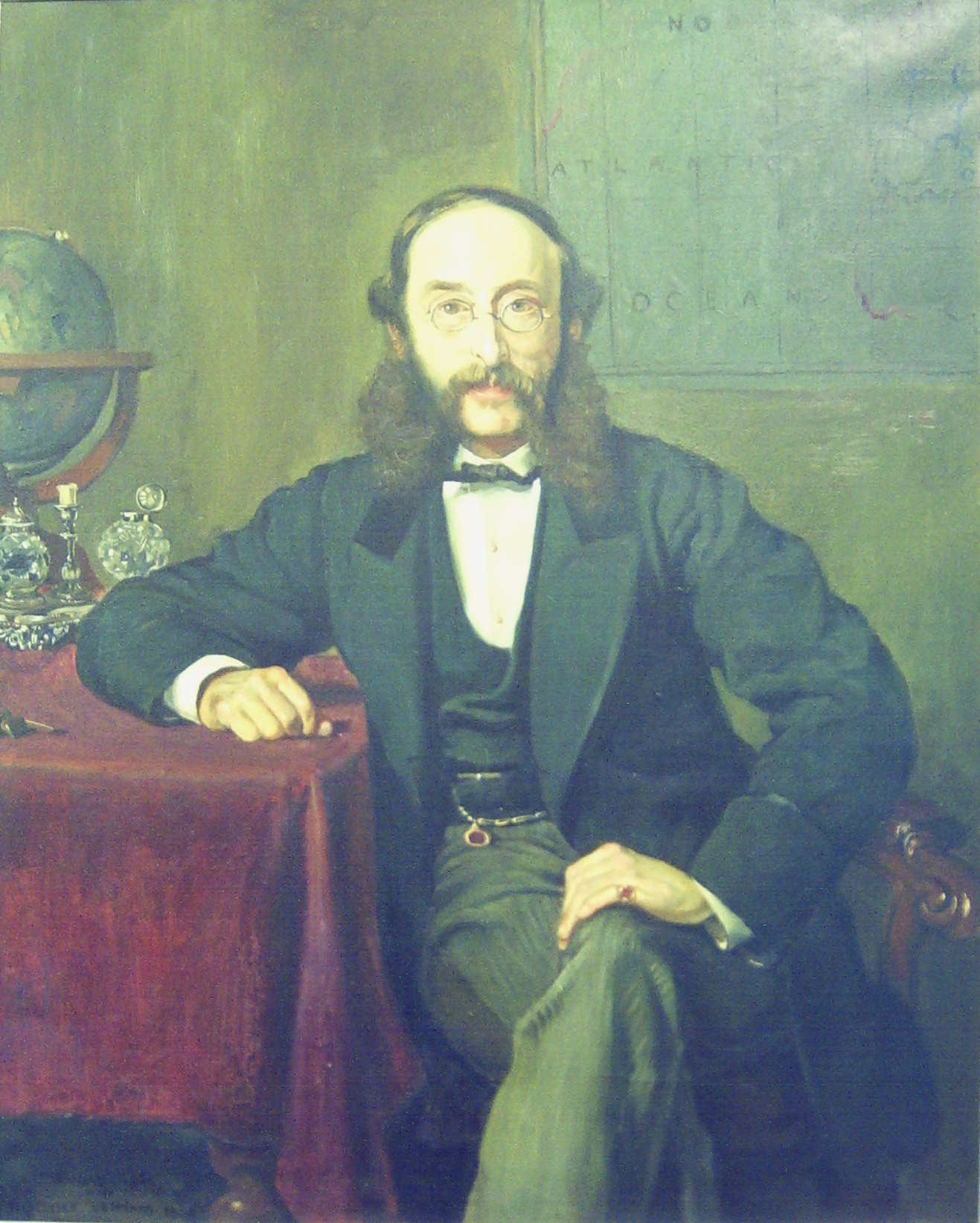 Beschriftung der Plakette: Baron Paul Julius Reuter -: 1816 - 1899 :- der im Jahre 1850 die Reuter Nachrichtenagentur in Aachen gründete. Geschenk der Agentur Reuter an die Stadt Aachen (19. Oktober 1962) Weitere Beschriftung: Paul Julius REUTER im Alter von 53 Jahren, 1869. originalgetreue Kopie eines Gemäldes von Rudolf Lehmann.